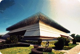 Auditorio Josefa — in Santiago de Querétaro, Municipality of Querétaro, Querétaro state, México.